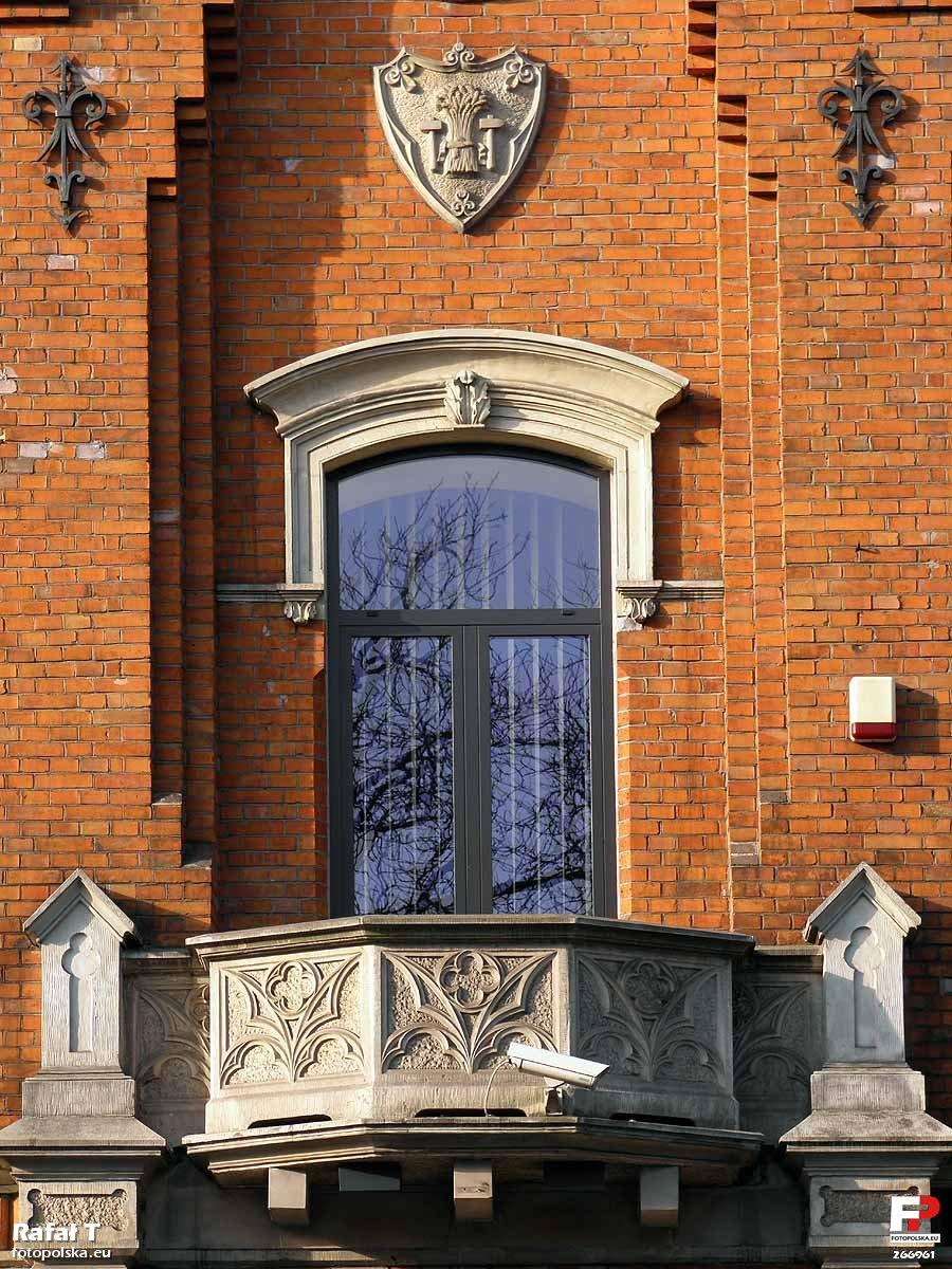 Jeden z dwóch bliźniaczych balkonów, powyżej herb Guberni radomskiej.